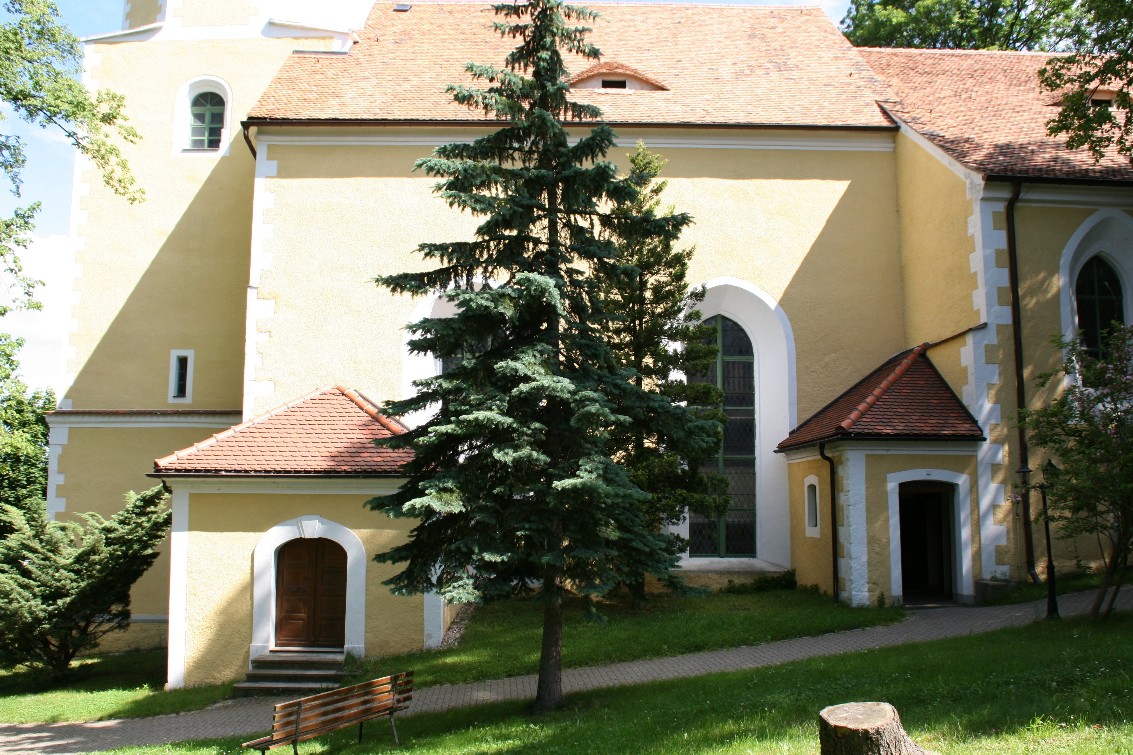 Evangelische Kirche Ebersbach, Kirchberg in Ebersbach, Schöpstal